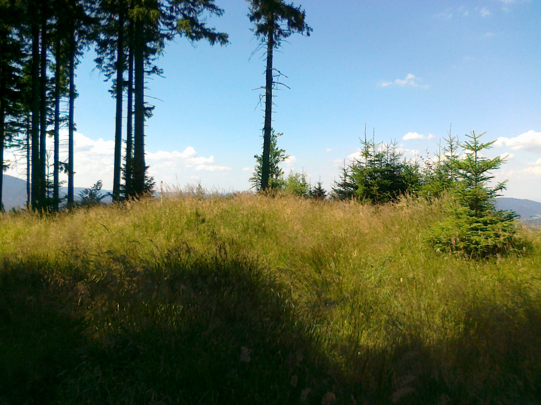 Widok na połać szczytową góry Zaječí hora - 1012 m n.p.m.